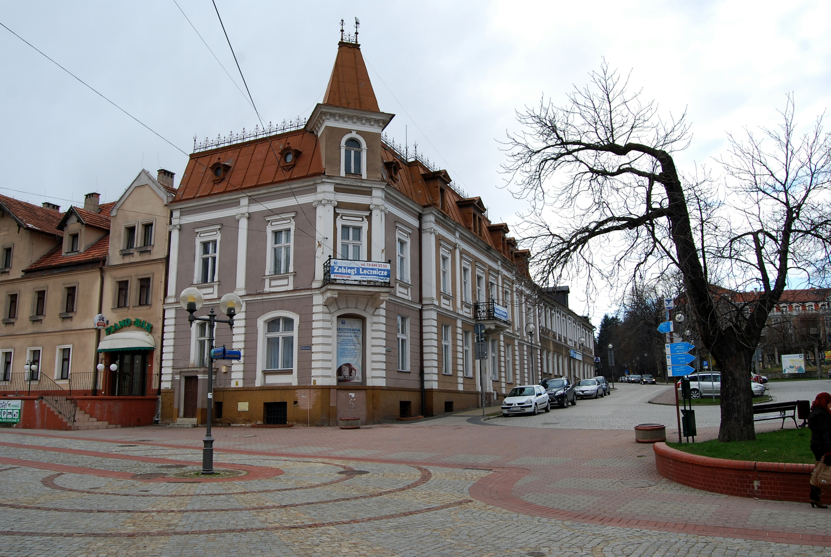 Szczawno-Zdrój, ul. Ratuszowa 1-2 - dawny pensjonat „Posthof”, obecnie biura, poł. XIX w. (zabytek nr 74/A/01 z 17.12.2001)